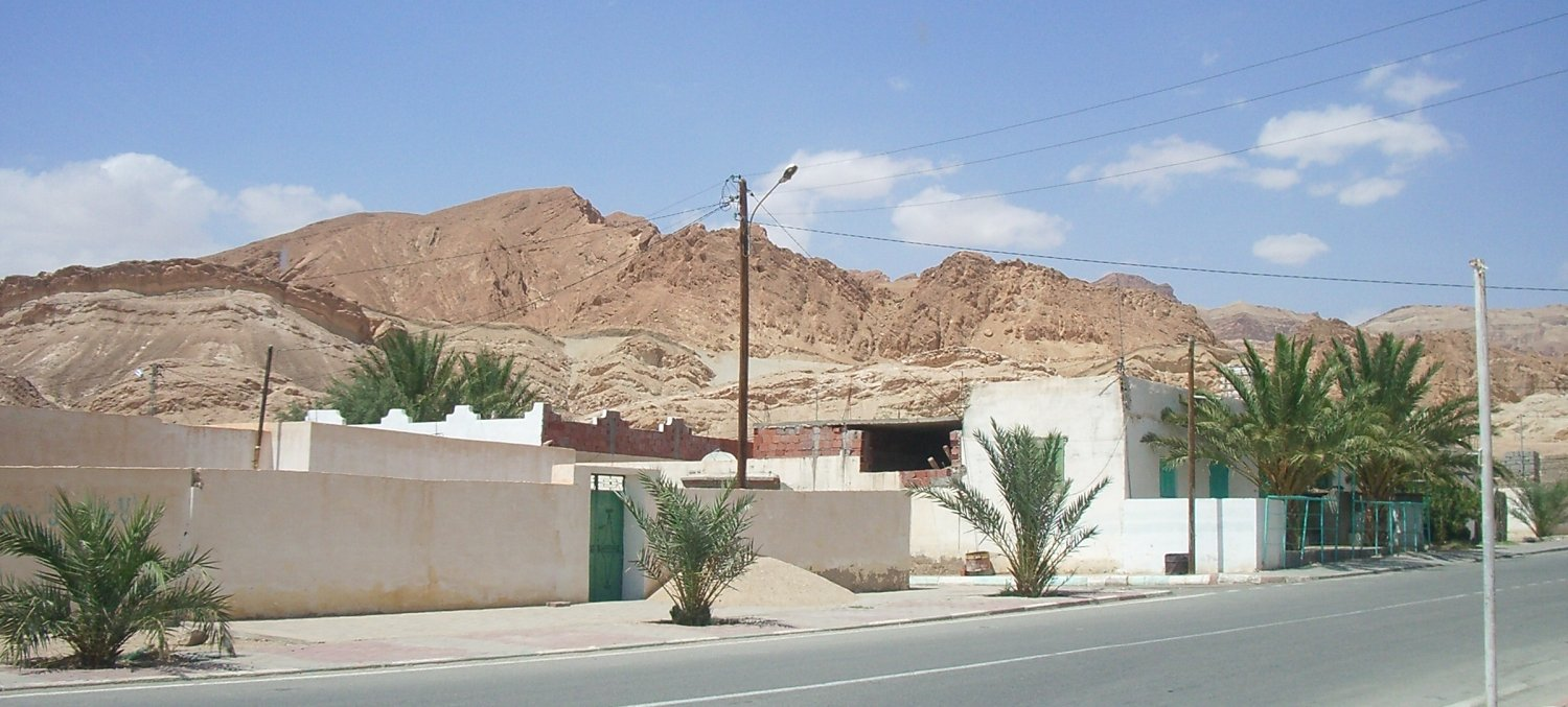 Chebika